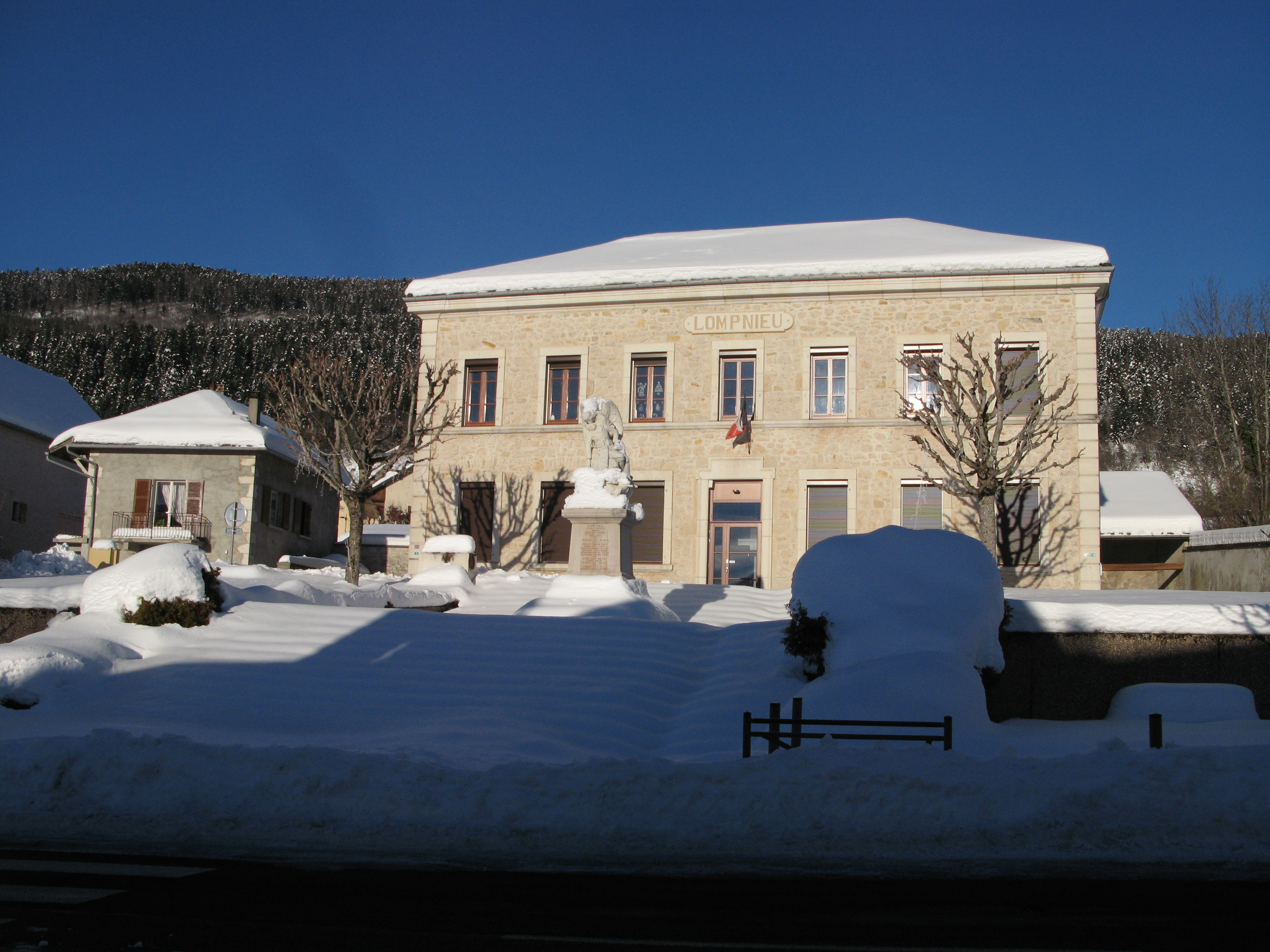 Mairie de Lompnieu sous la neige